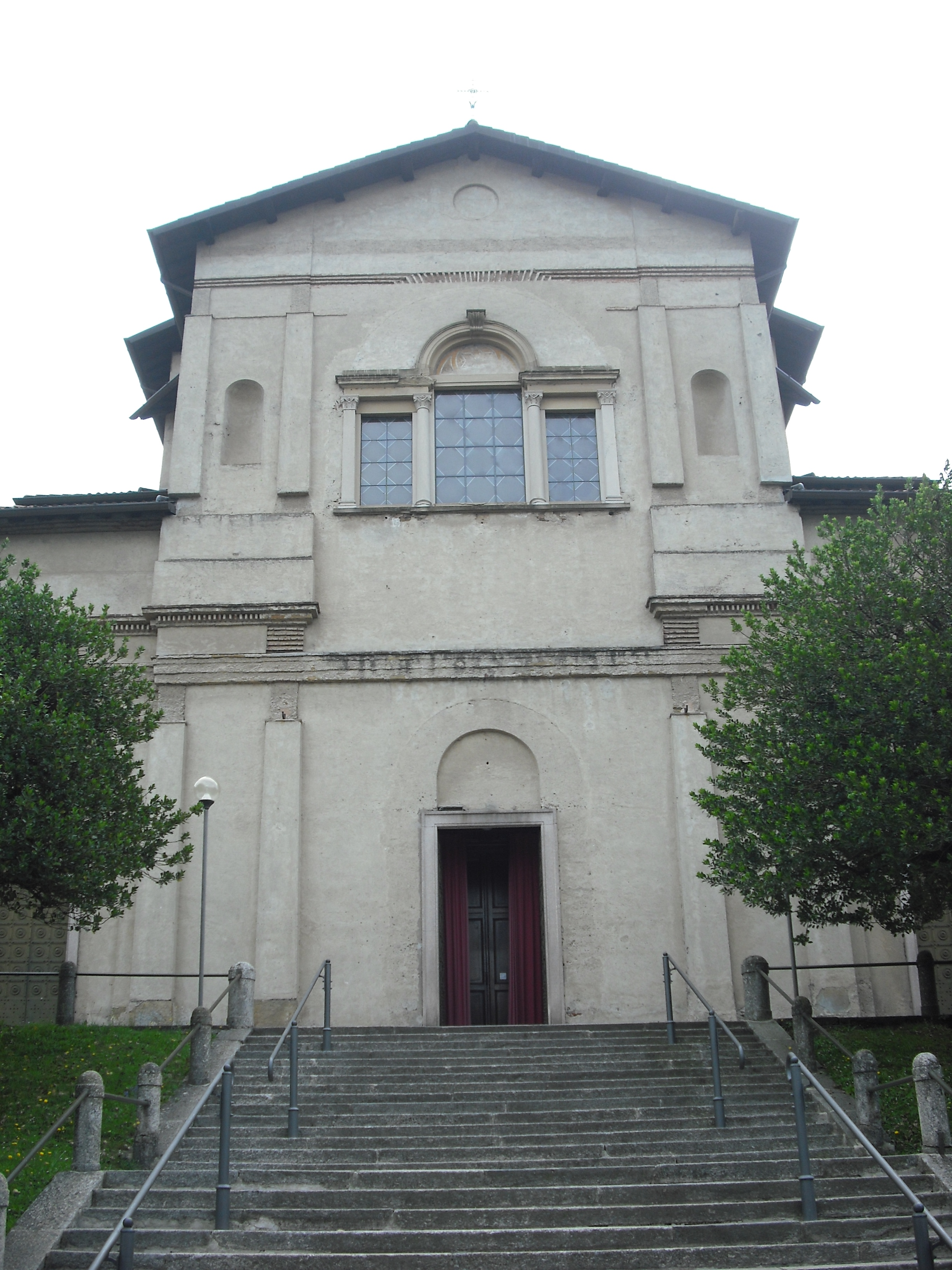 La chiesa parrocchiale di Sirtori (Lc)